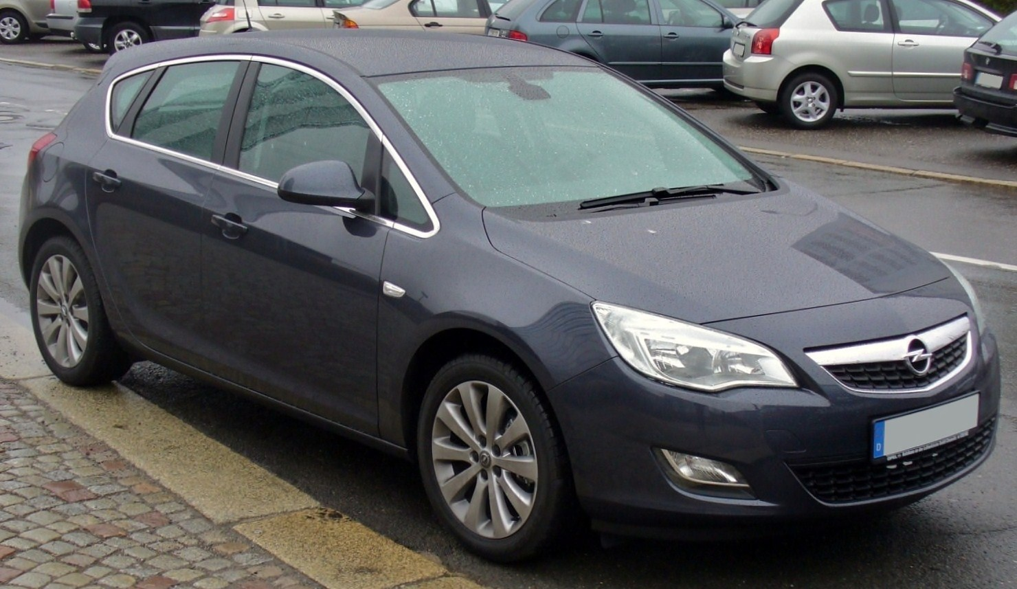 Opel Astra J